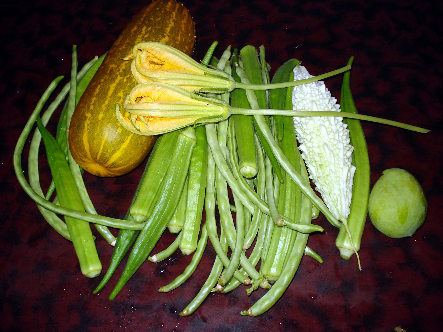 കറിവെക്കാനായി പുരയിടത്തുനിന്ന് പറിച്ചെടുത്ത പച്ചക്കറി ഇനങ്ങൾ